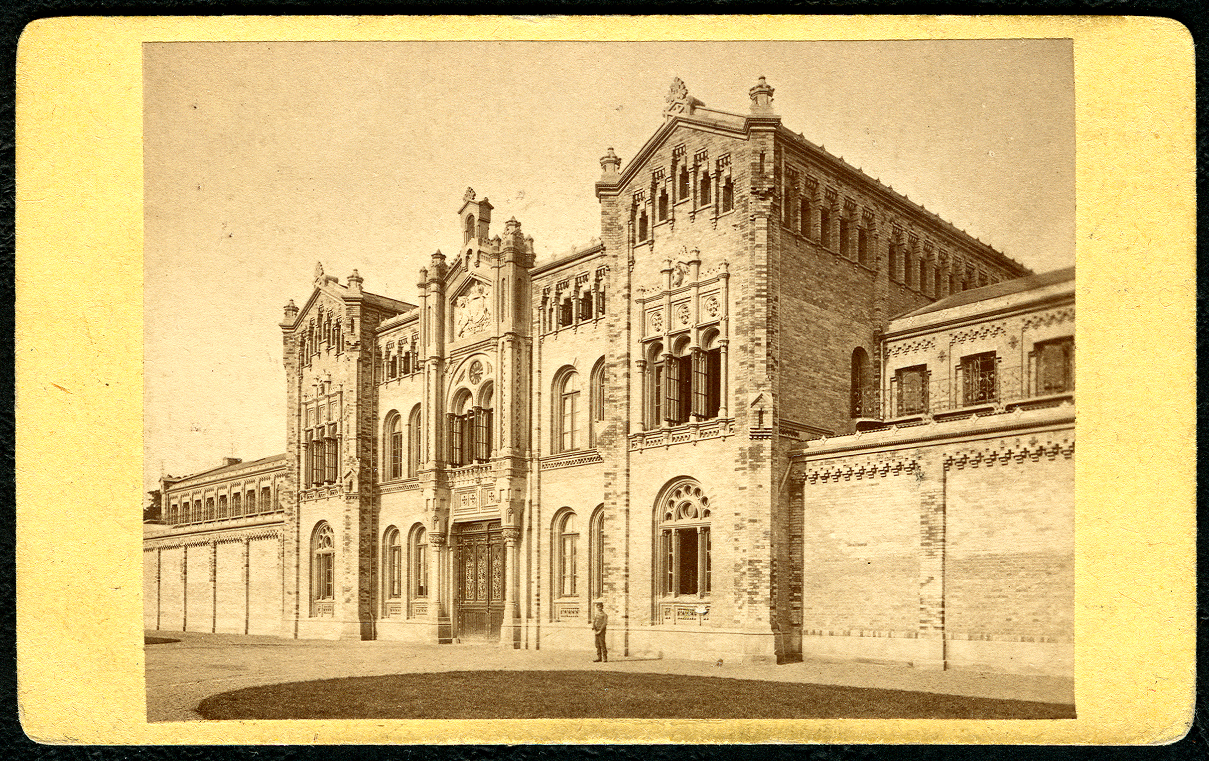 Bildseite der Carte de Visite mit einem Albumin-Abzug des Marstalls beim Welfenschloss in Hannover aus der „Papier & Kunsthandlung“ von Carl Hahne's, nach der handschriftlich von Unbekannt hinzugefügten Information (siehe unten, Adressseite) um 1880 gefertigt ...